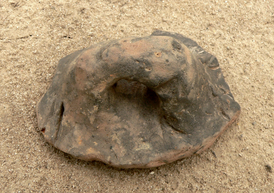 Bandkeramischer Fundplatz von Imbshausen und Eboldshausen Autobahn, Westseite, Fundstück Henkelgriff eines Gefäßes